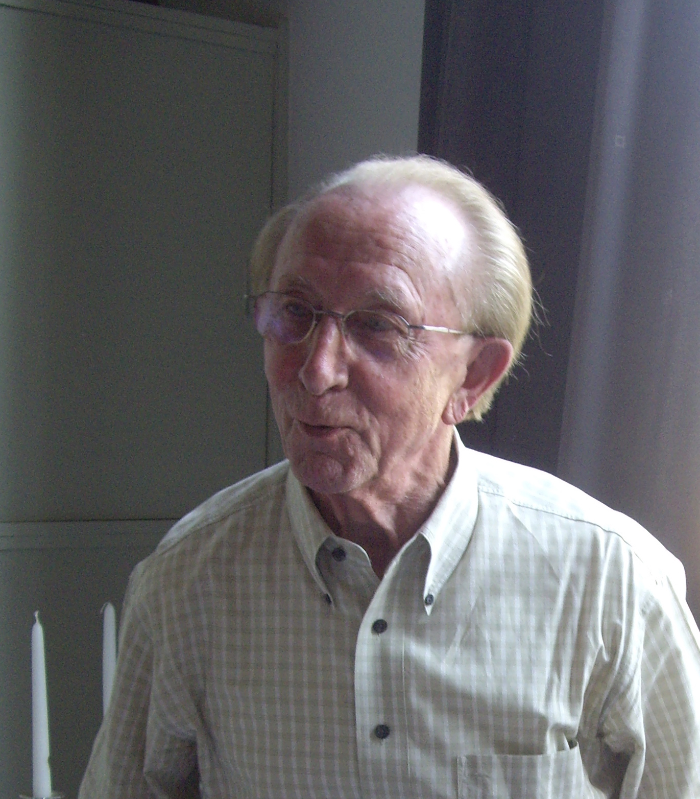 Rik Evens